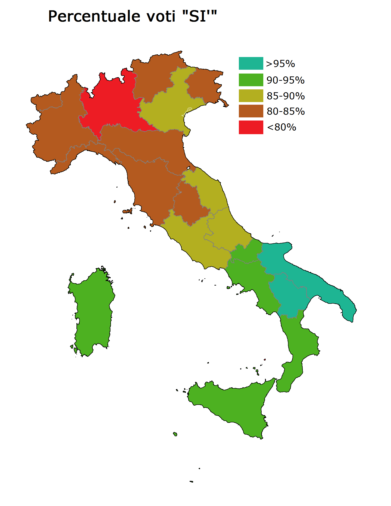 Nell'immagine sono considerati i voti del SI'.